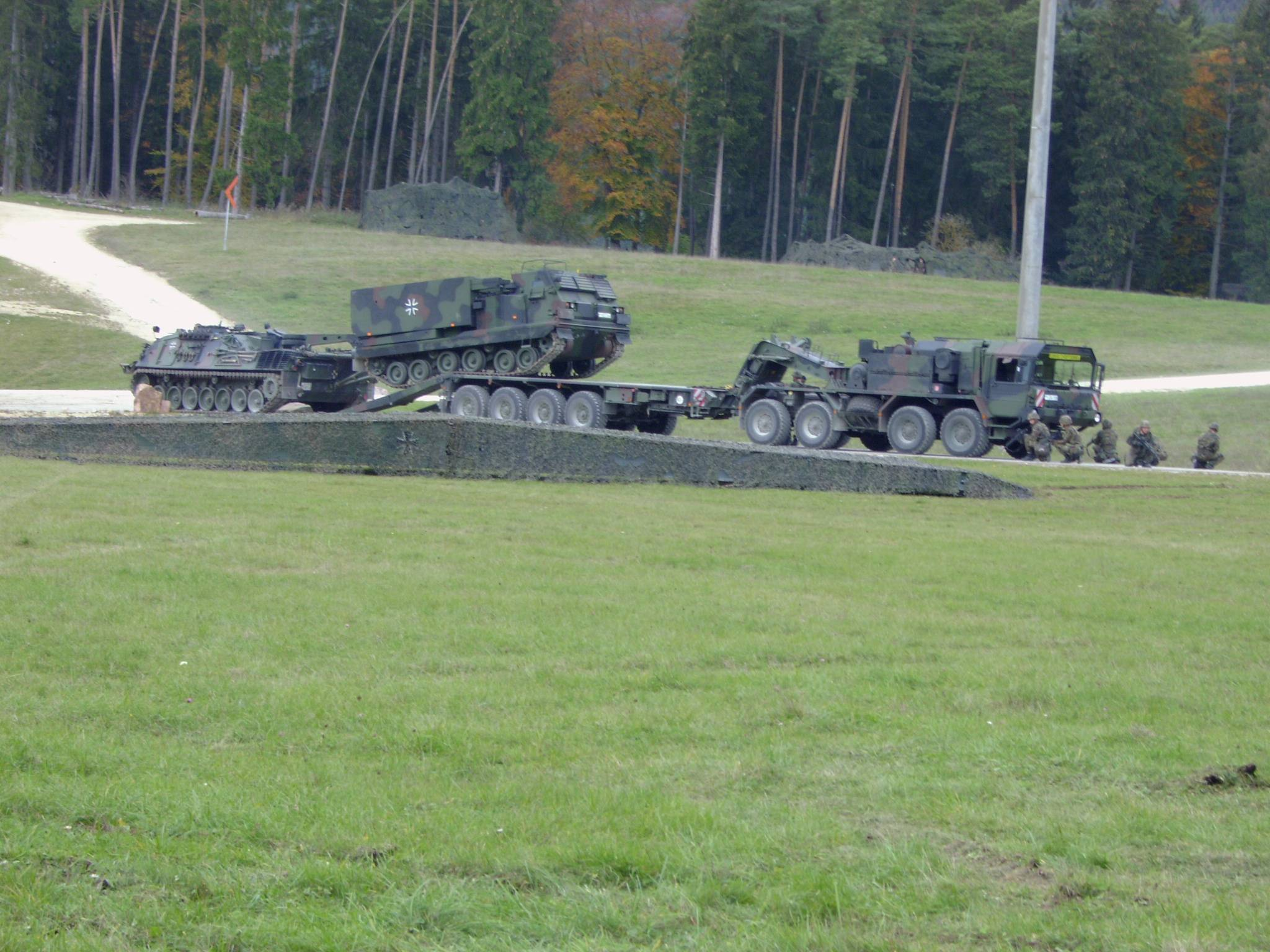 Bundeswehr: Bergepanzer 2A2 (BPz 2A2) schiebt Raketenwerfer Mars auf Schwerlasttransporter (SLT) Elefant (REUNION 2006). Im Vordergrund eine mit Tarnnetzen bedeckte abgelegte Panzerschnellbrücke Biber.